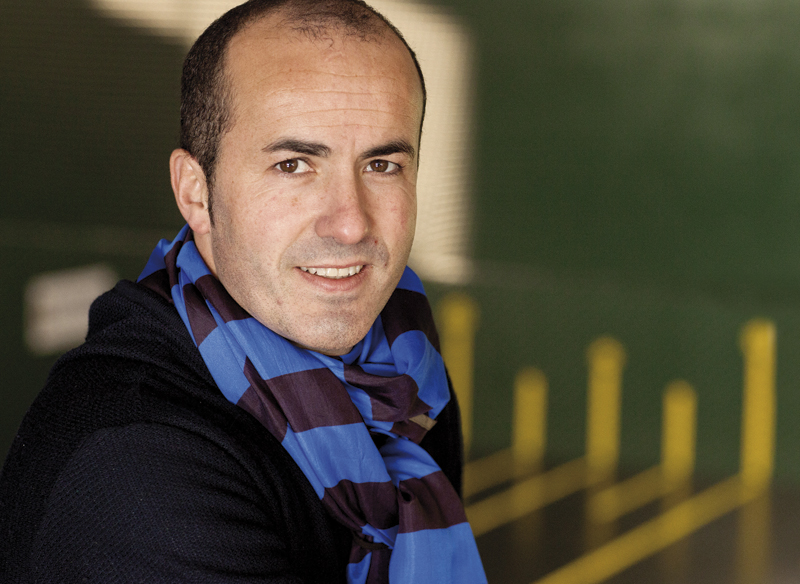 Jose Koteto Ezkurra (Doneztebe, Nafarroa Garaia, 1973ko abuztuaren 9a), erremonteko pilotari profesionala.